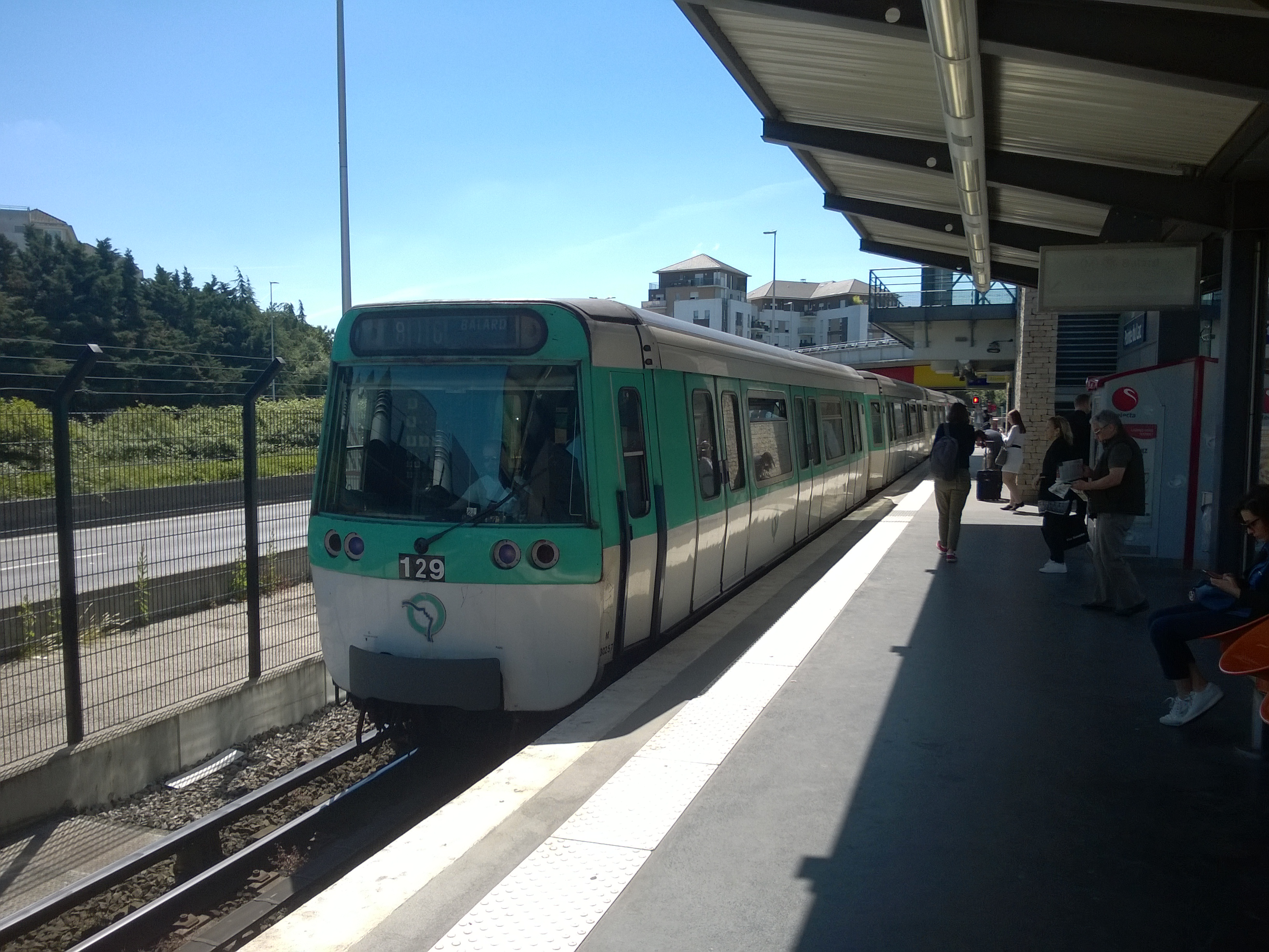 Station de métro Créteil - Pointe du Lac, département du Val-de-Marne, France.MF 77 pour Balard.